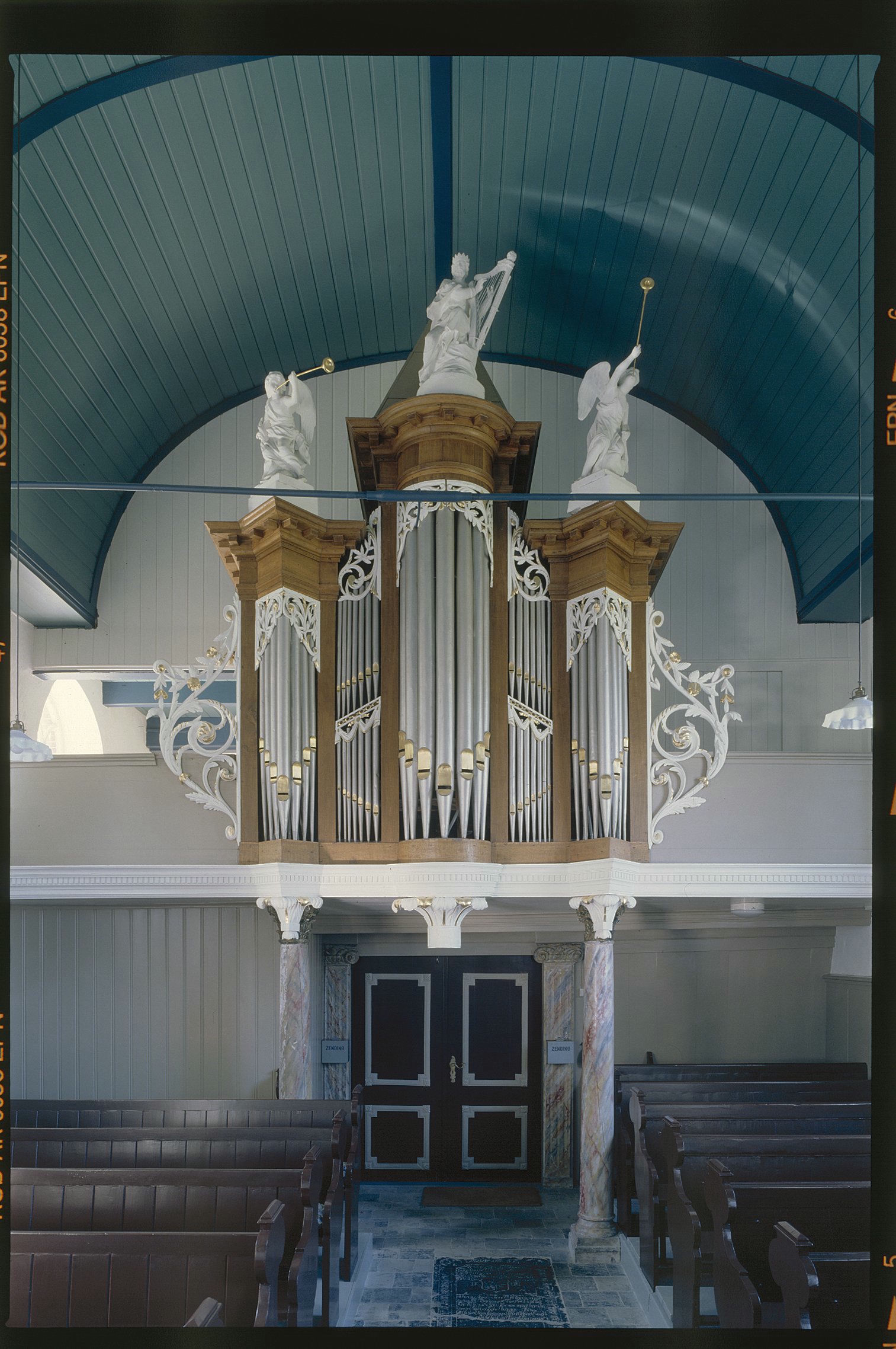 Nederlands Hervormde Kerk: Interieur, aanzicht orgel, orgelnummer 1031 (opmerking: Gefotografeerd voor Het Historische Orgel in Nederland 1790-1818)